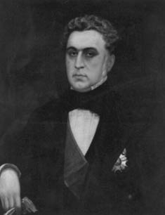 Obra da coleção Brasiliana Iconográfica.